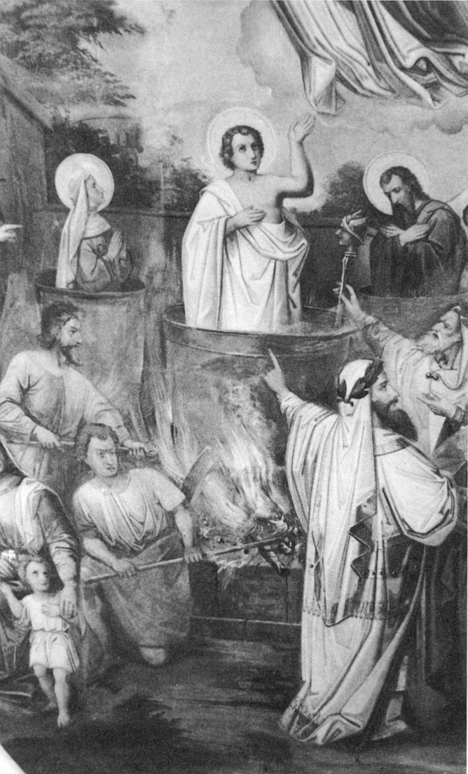 St. Vitus Veitsaurach, Deckengemälde. Der Heilige Vitus (Veit), Patron der Kirche und Gemeinde Veitsaurach, mit Pflegeeltern Modestus und Kreszentia